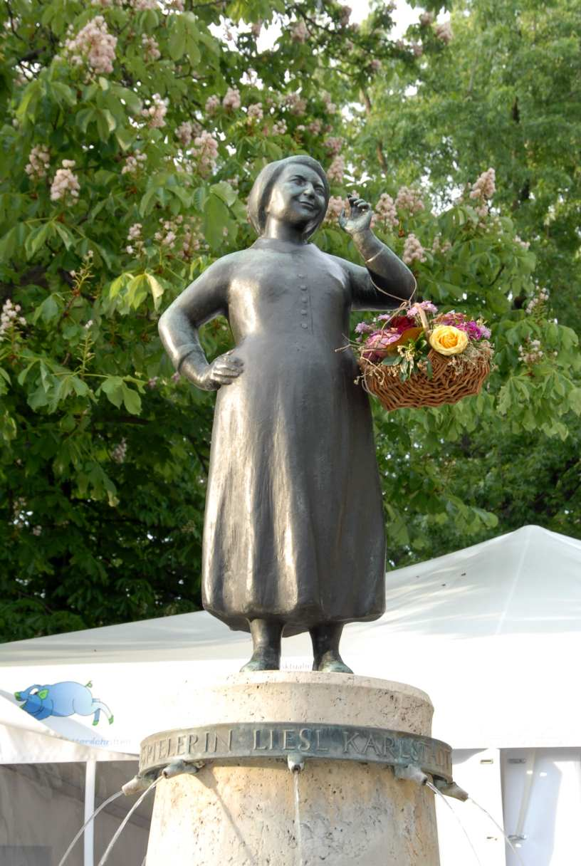 Liesl-Karlstadt-Brunnen auf dem Viktualienmarkt in München, von Hans Osel (1961).